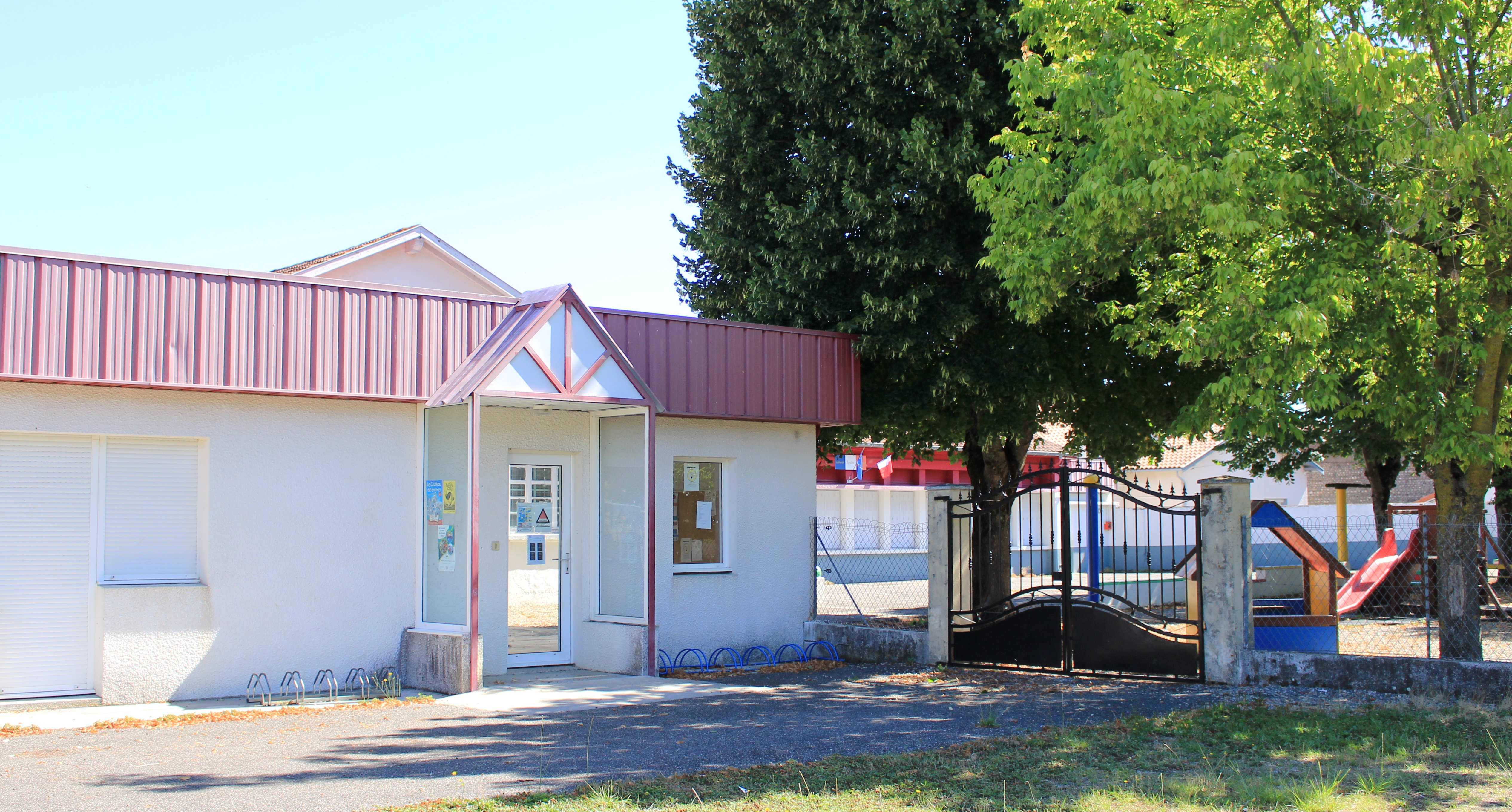 École de Bours (Hautes-Pyrénées)